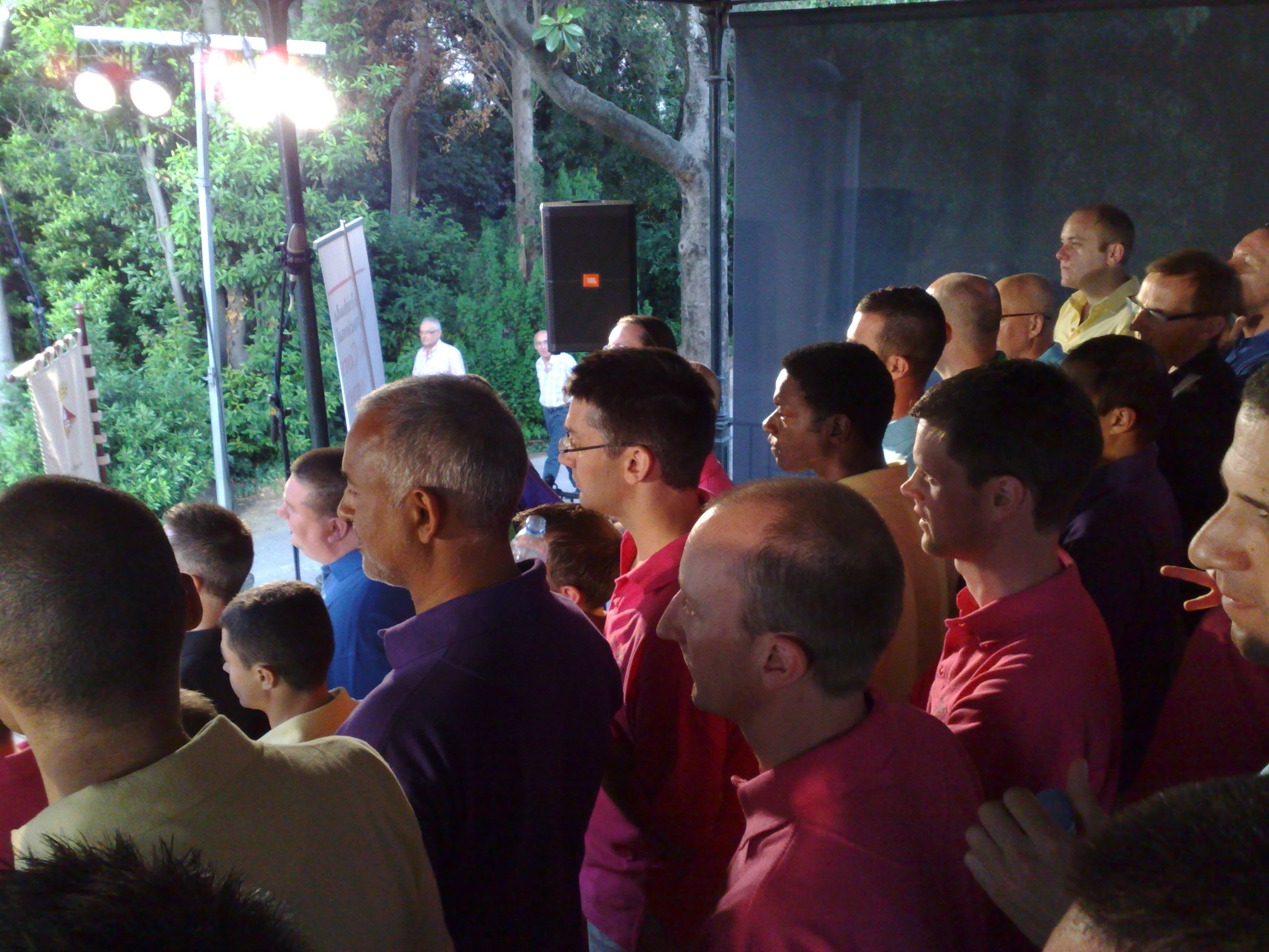 London Gay Men's Chorus during a perfomance in Castellar del Vallès (Catalunya, Spain)